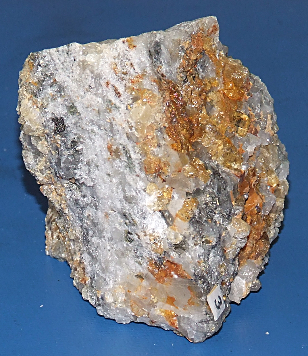 Topas-Turmalin-Brekzie, Schneckenstein (Sachsen)